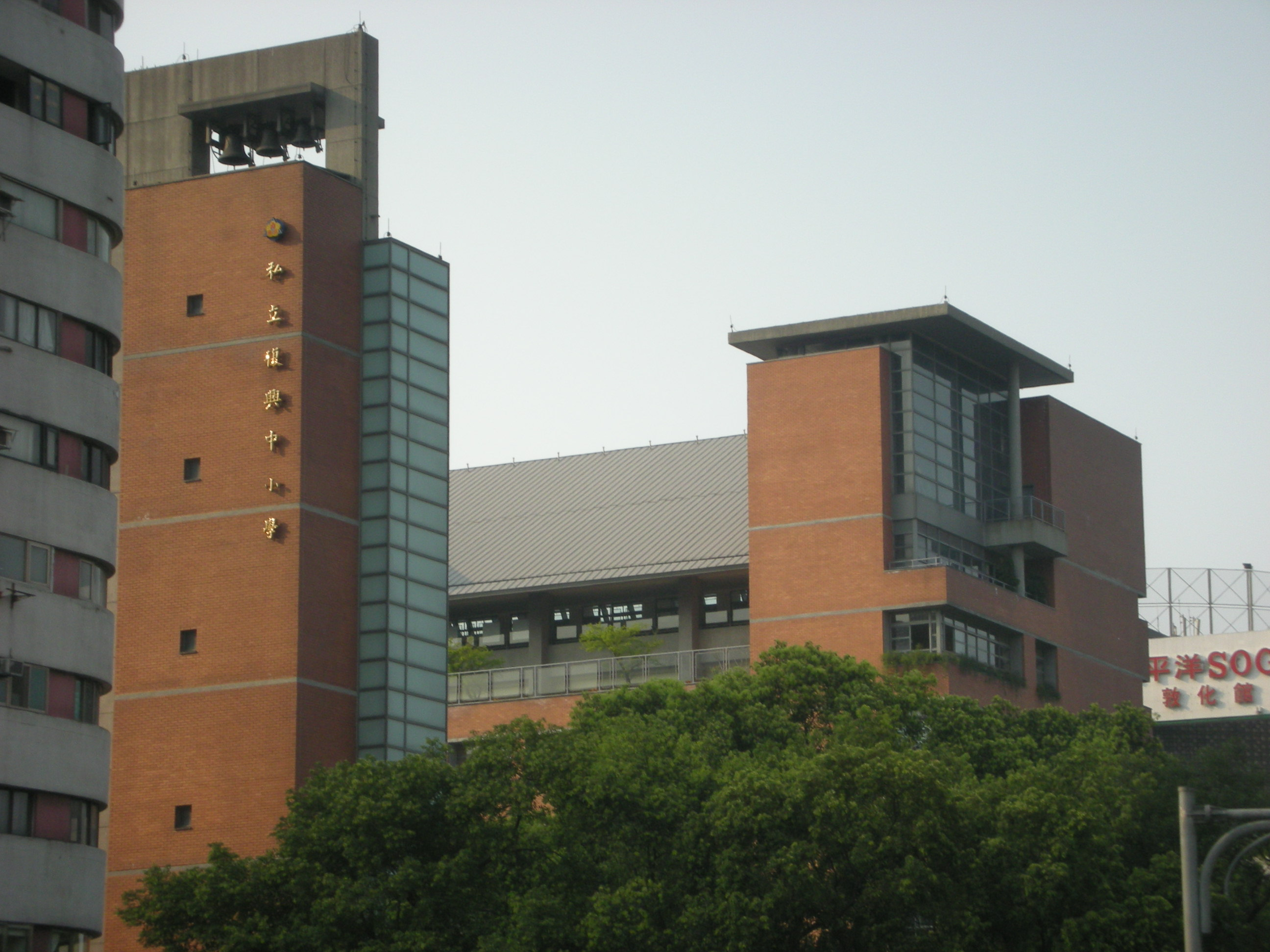 臺北市私立復興中小學，位於臺北市大安區敦化南路一段262號。